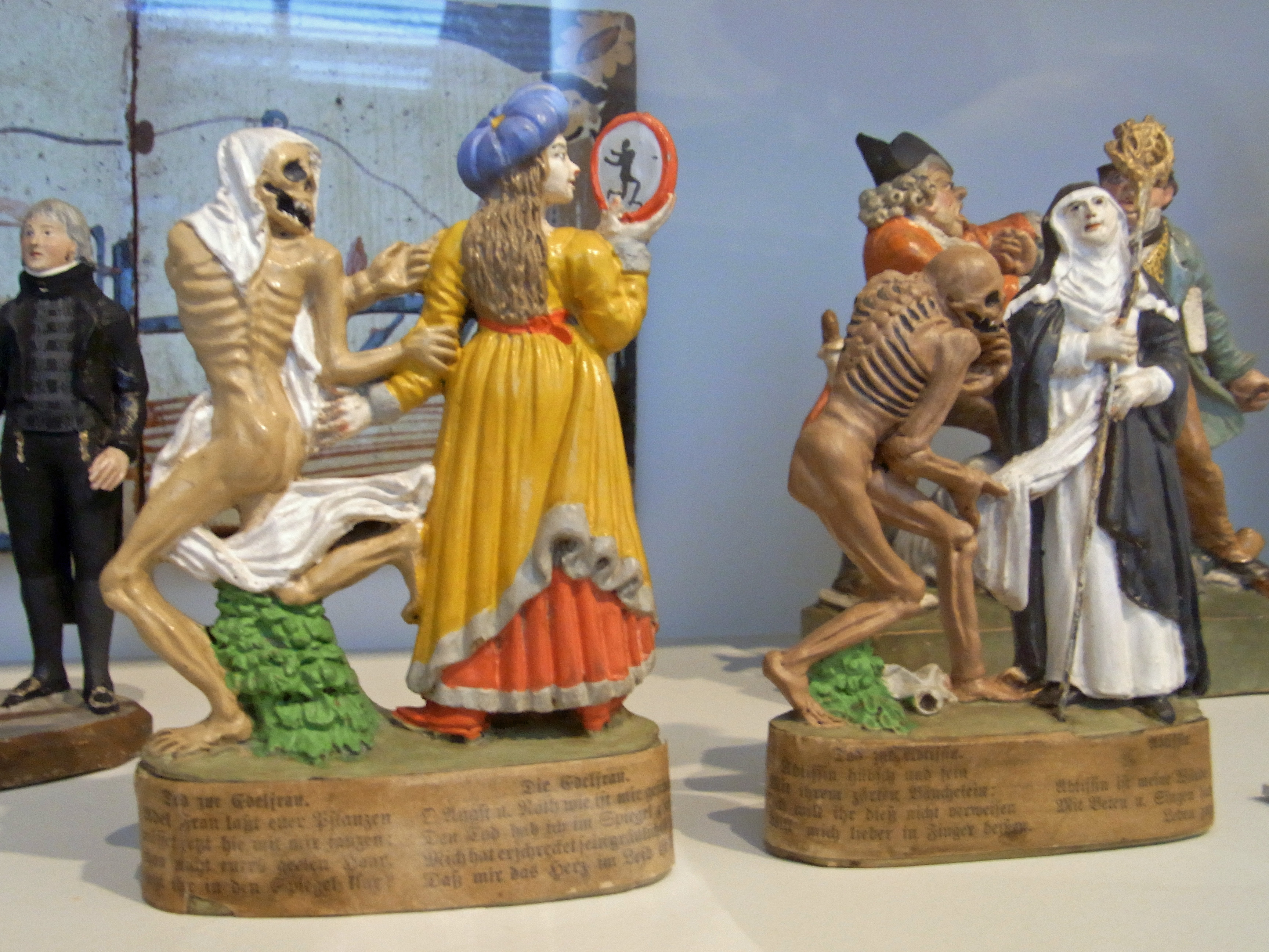 Landesmuseum Württemberg (Außenstelle Museum für Volkskultur in Württemberg, Waldenbuch) Tod und Edelfrau, Tod mit Äbtissin, gebrannter Ton, kalt bemalt, A. Sohn, Zizenhausen, 1. Hälfte 19. Jhd. 1.1.1, Inv. Nr. 11 570 mm und g, 12 381